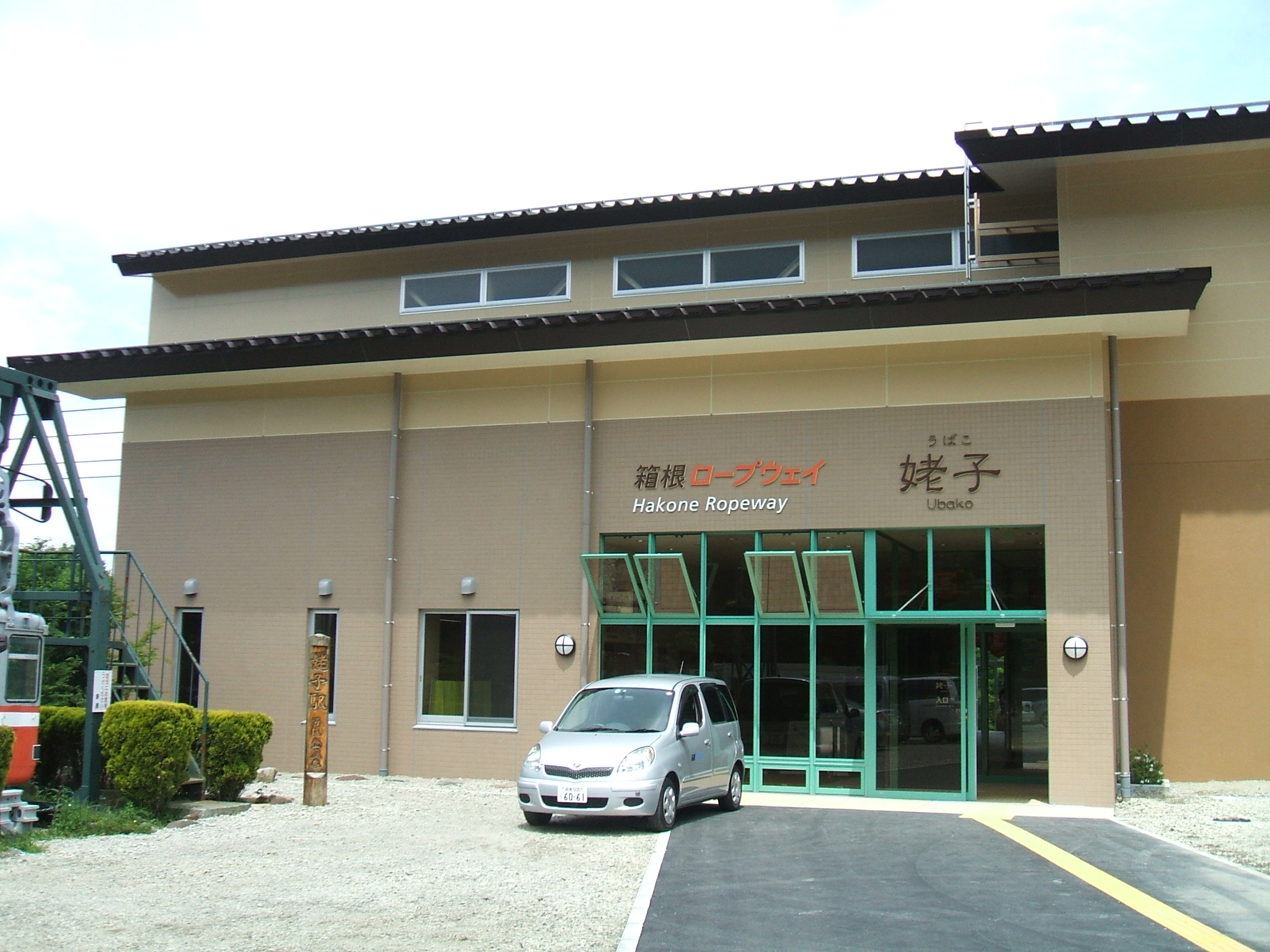 現在の姥子駅の駅舎。2007年6月に投稿者が撮影。